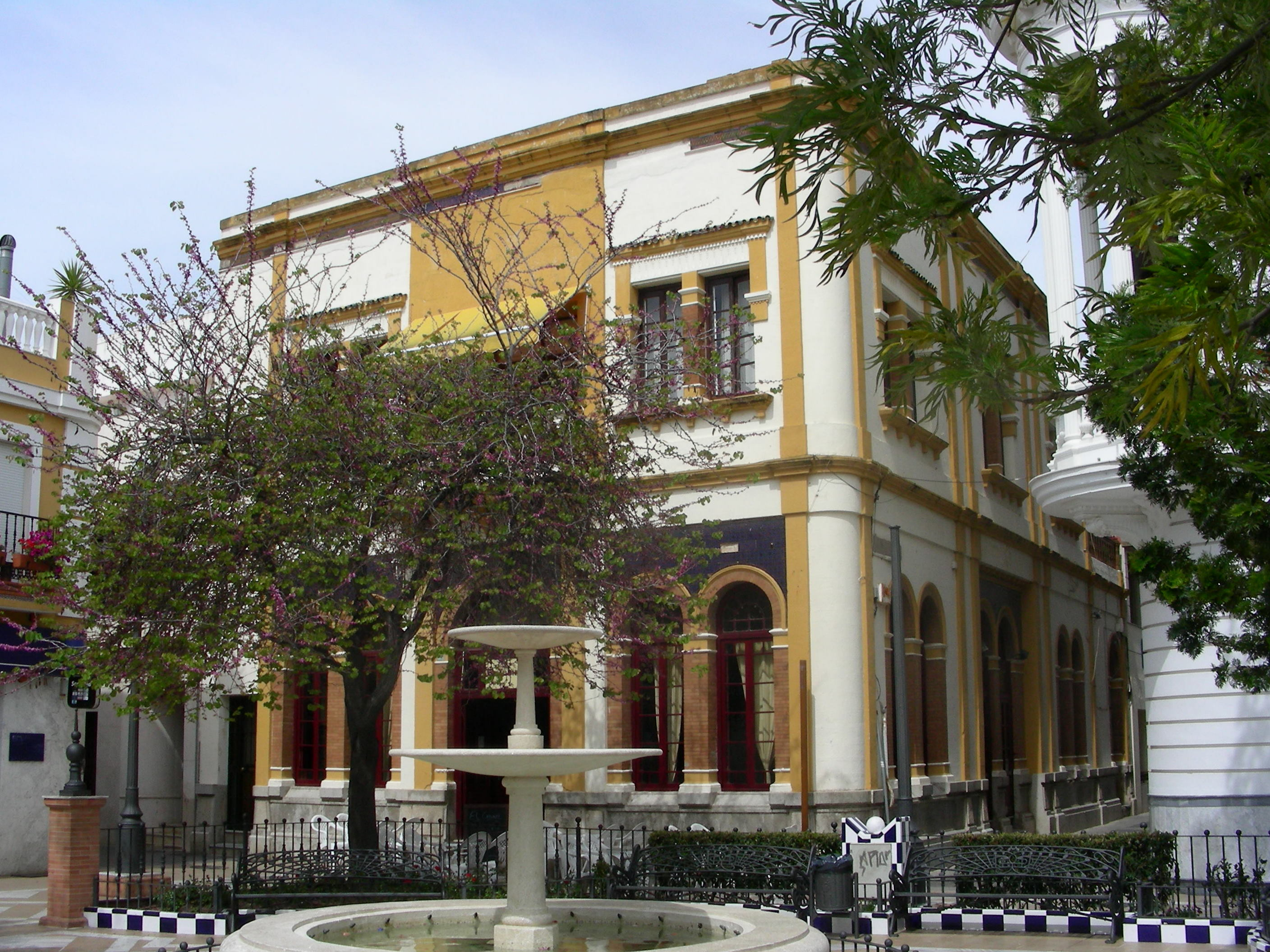 Casino La Union de Isla Cristina